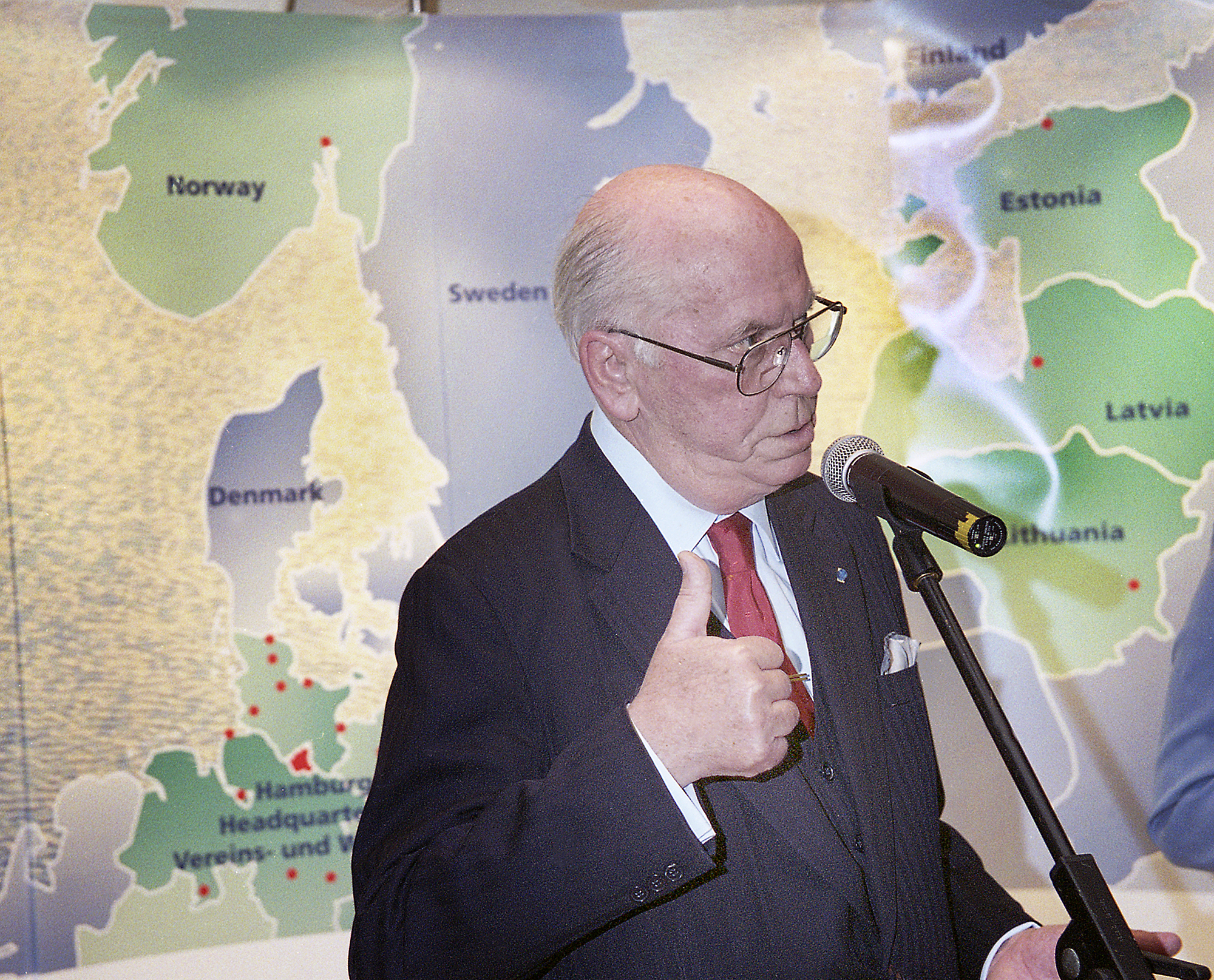 Lennart Meri Euroopa kaarti taustal 02